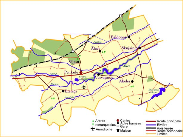 Territoire de Penkule (pagasts de Lettonie).